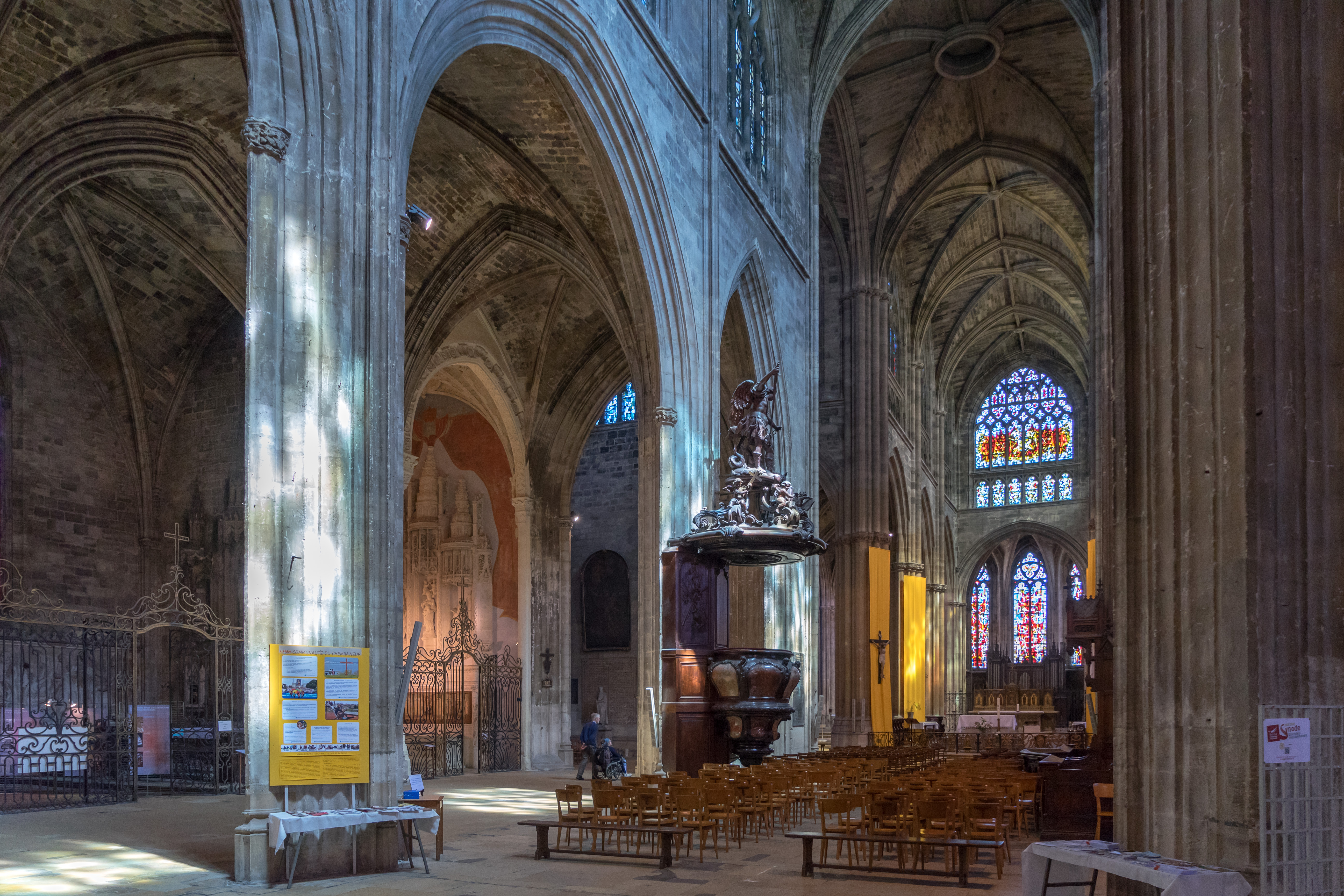 Bordeaux - Basilique Saint-Michel - Nef avec sa chaire à prêcher.